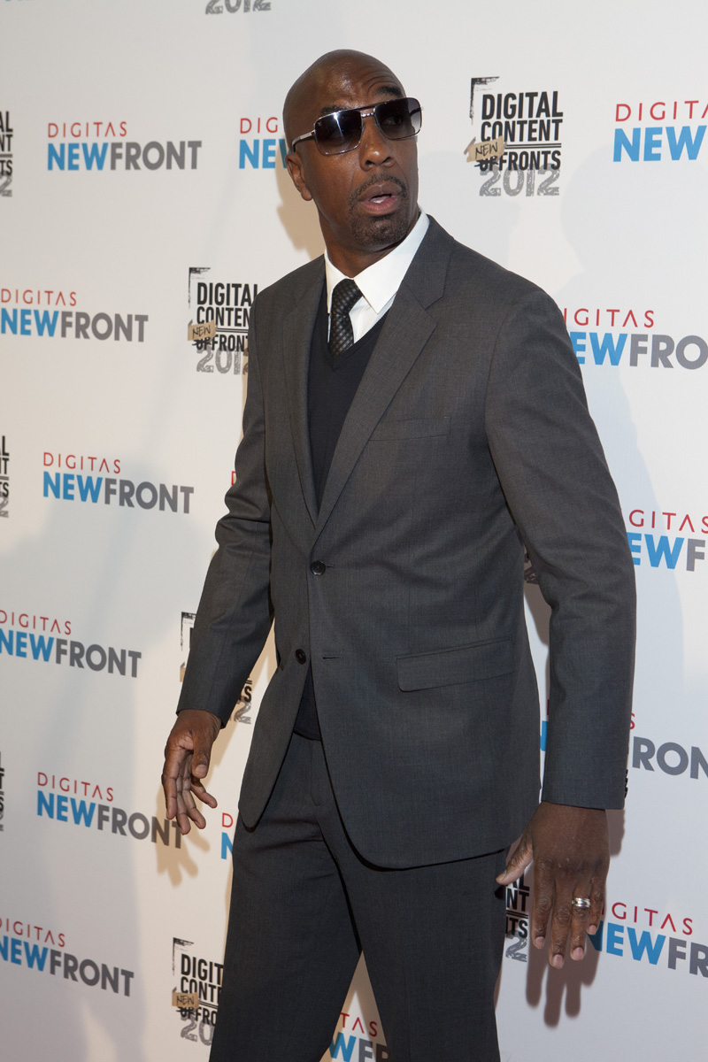 JB Smoove